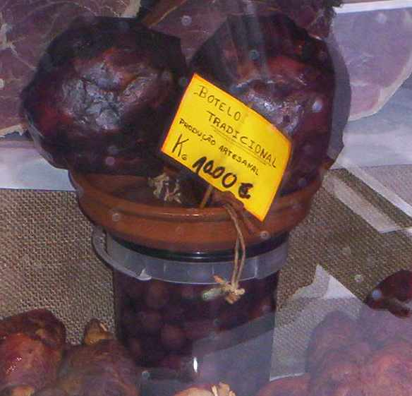 Botelo, a portuguese sausage.